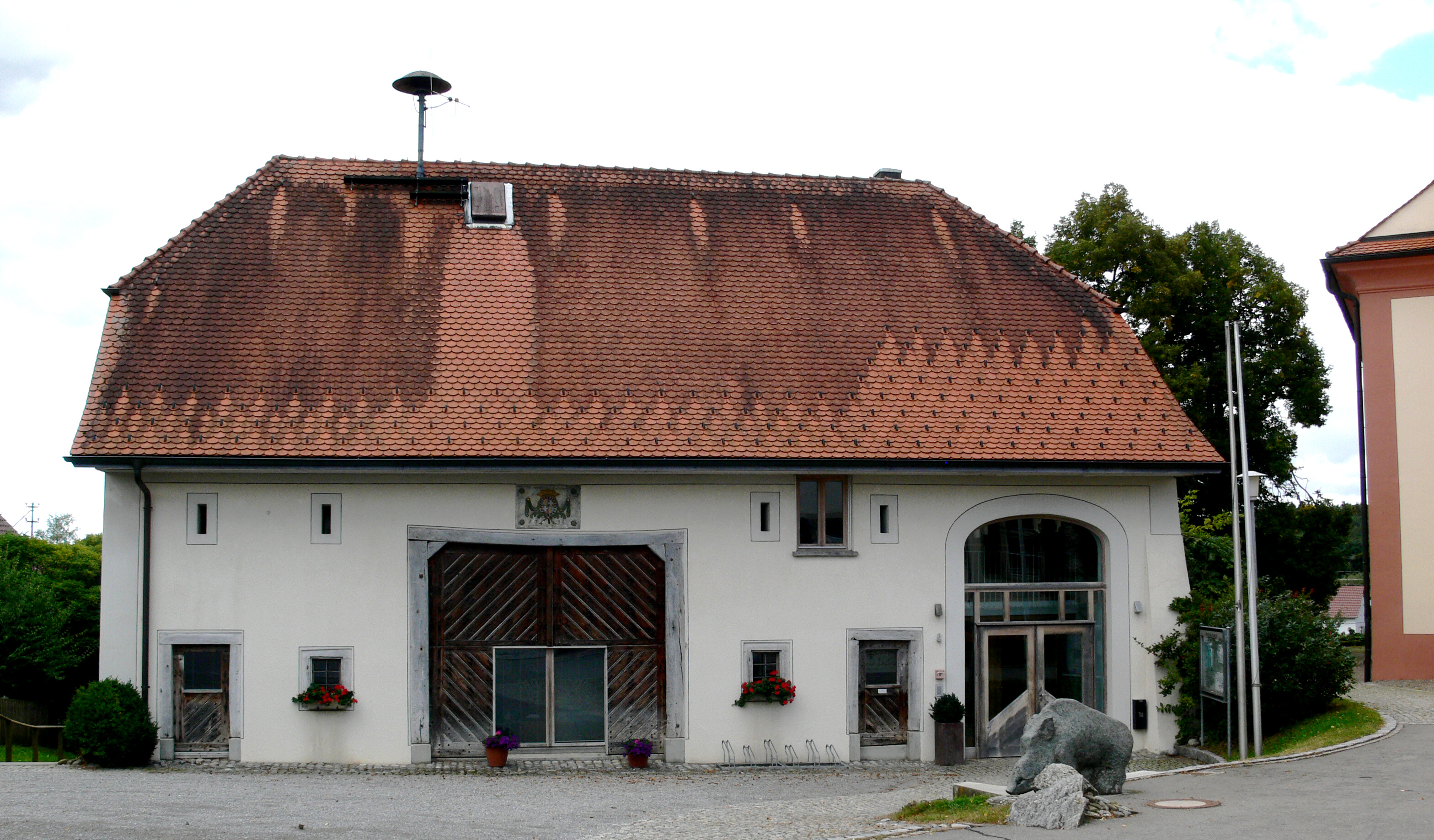 Ebersbach, Gemeinde Ebersbach-Musbach, Landkreis Ravensburg Pfarrscheuer, heute Rathaus der Gemeinde Ebersbach-Musbach